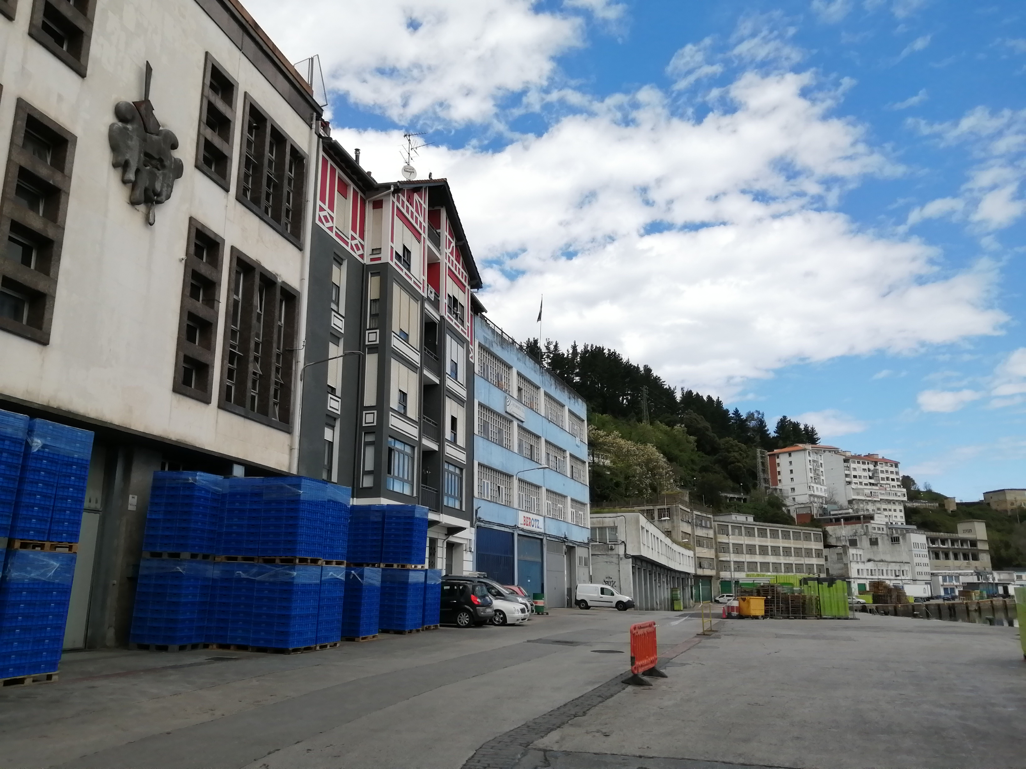 Ondarroako portua